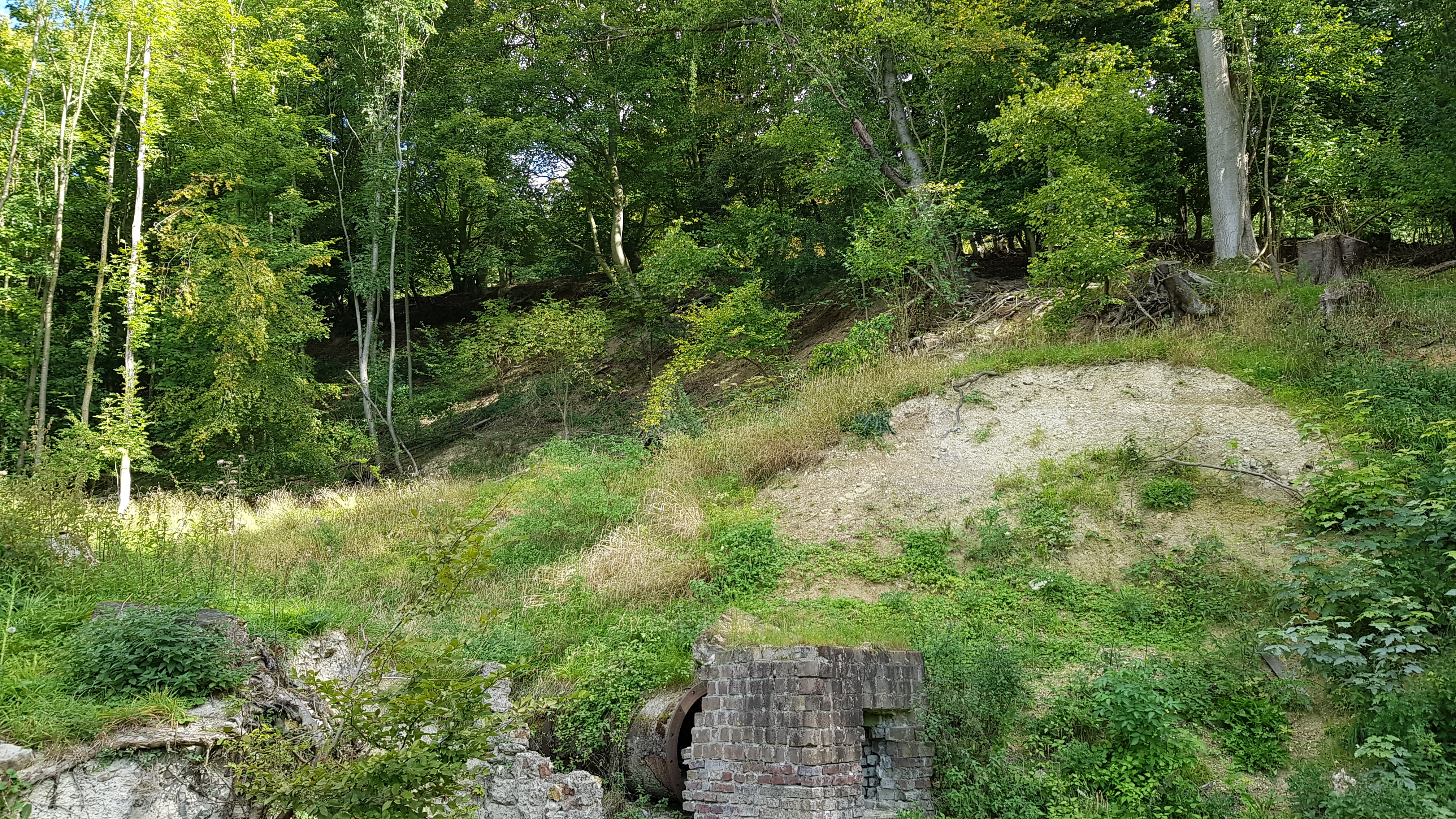 Groeve Habets, Beutenaken, Gulpen-Wittem, Nederland